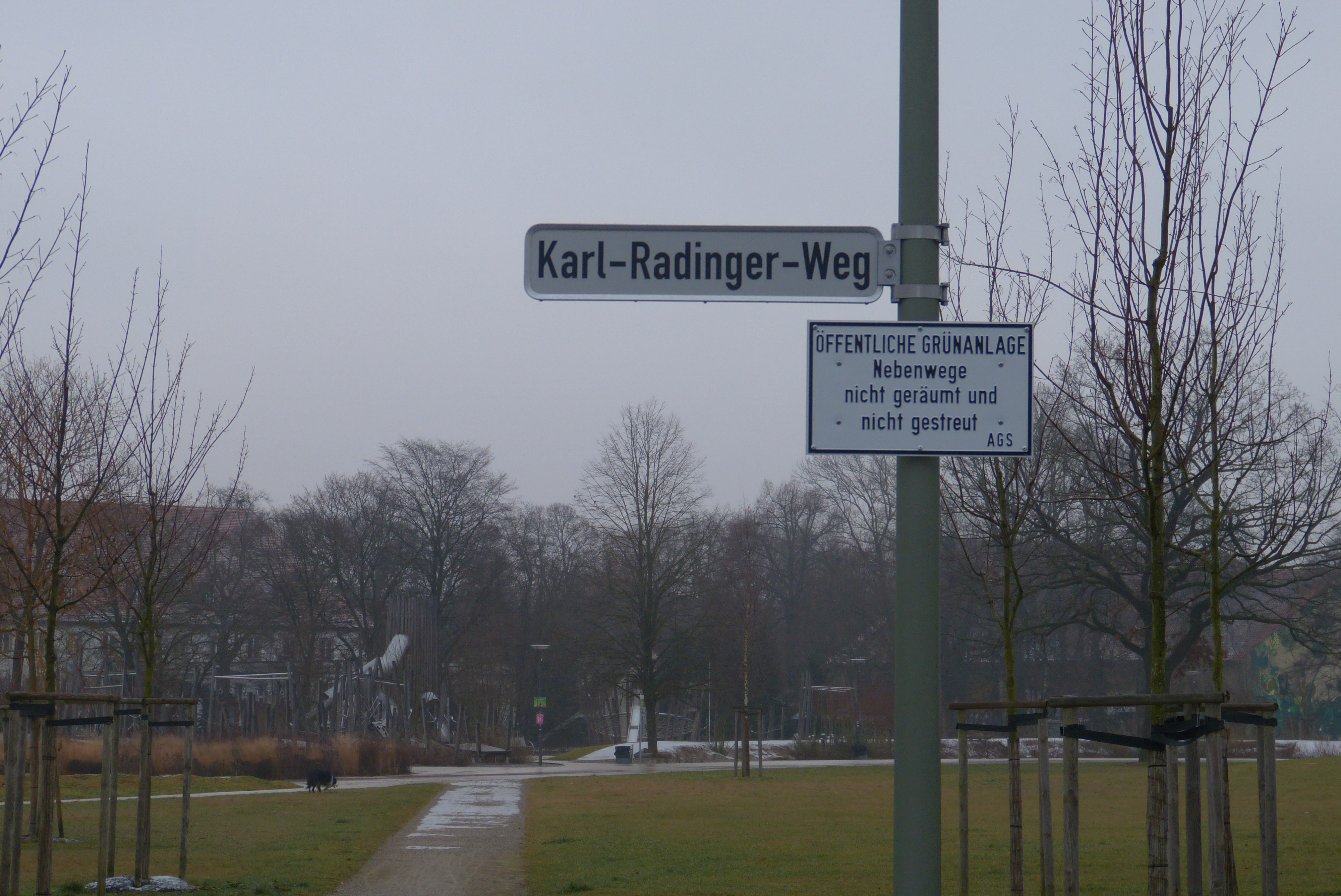 Blick in die Grünanlage des Reese-Parks, im Vordergrund das Straßenschild "Karl-Radinger-Weg".